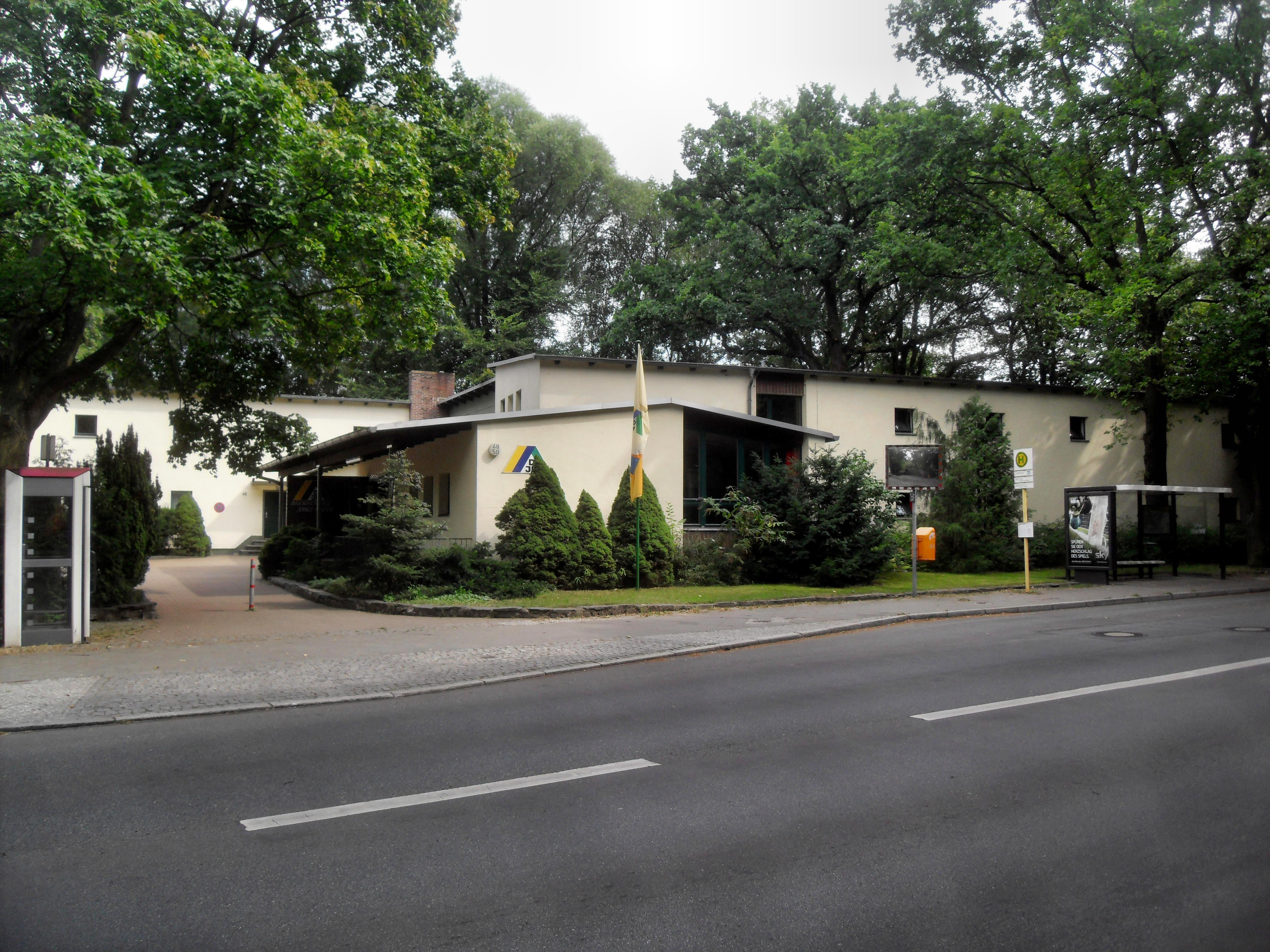 Das Hauptgebäude der Jugendherberge Ernst Reuter in Berlin-Hermsdorf in Deutschland von der Straße Hermsdorfer Damm aus